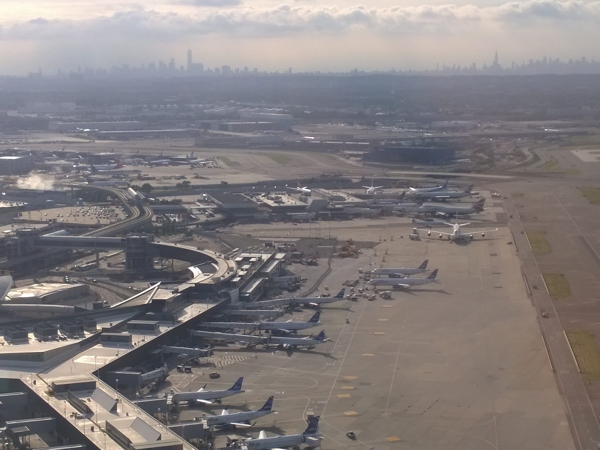 Blick auf Abfertigungshalle 5 und 7 des John F. Kennedy Flughafens in New York. Im Hintergrund sind die Wolkenkratzer Manhattans zu sehen.